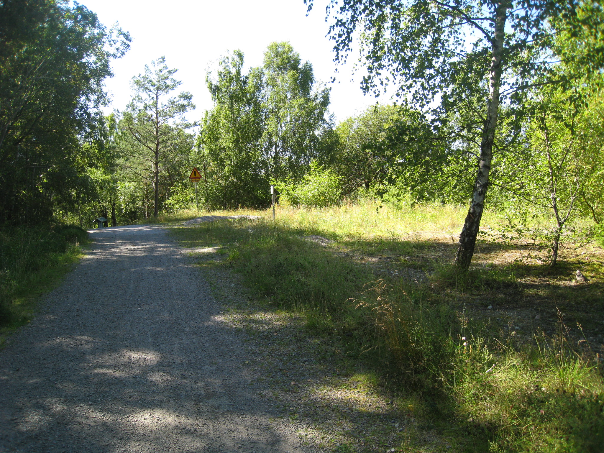 Platsen till höger på bilden visar "Här låg Viksjö såg" åren 1963-1980 i Sandvik, Viksjö, Järfälla kommun. I terrängen finns fortfarande husgrunder kvar som visar var byggnaderna en gång låg.